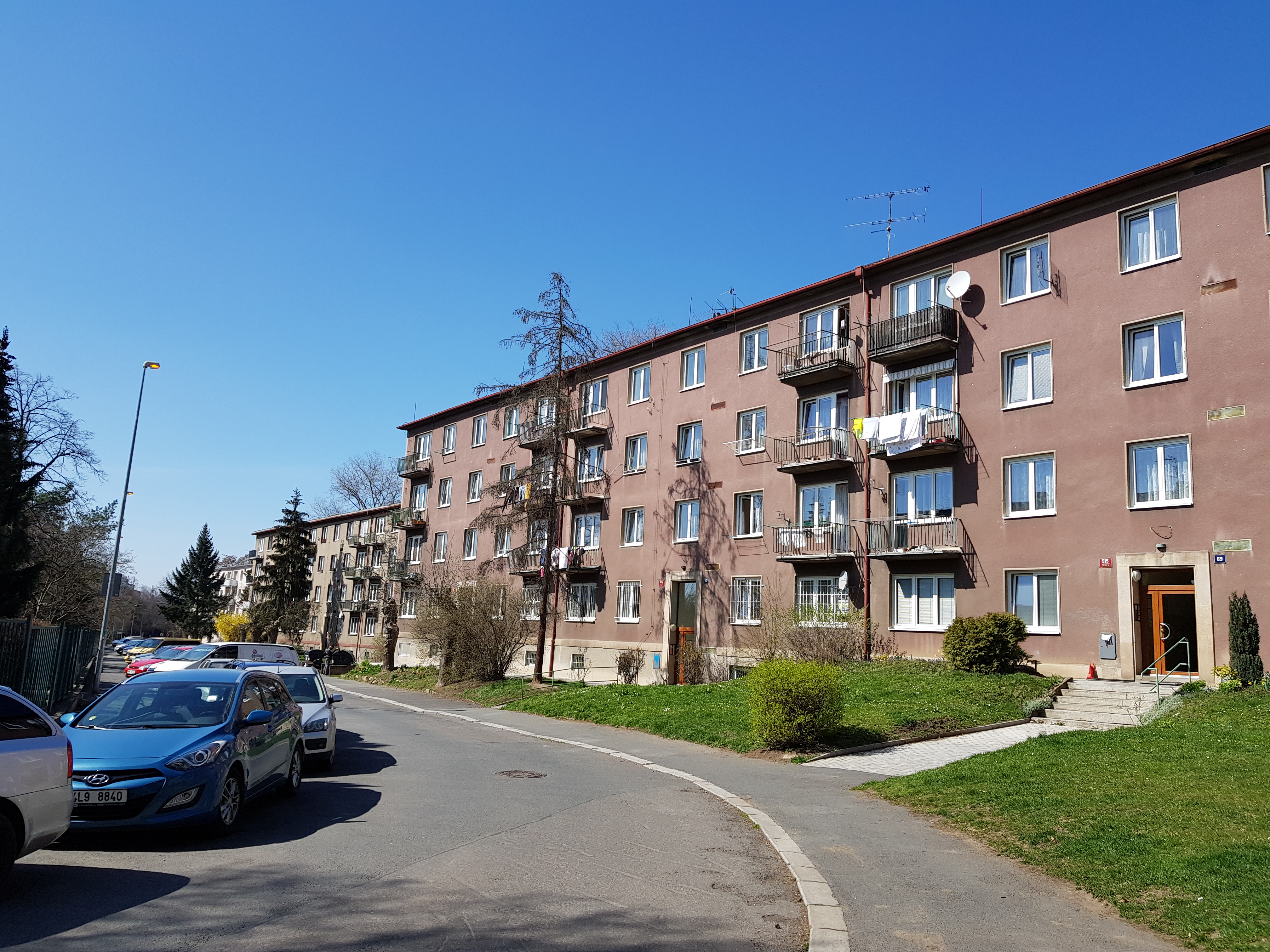 Ulice Zelenečská, Praha 14 - Hloubětín